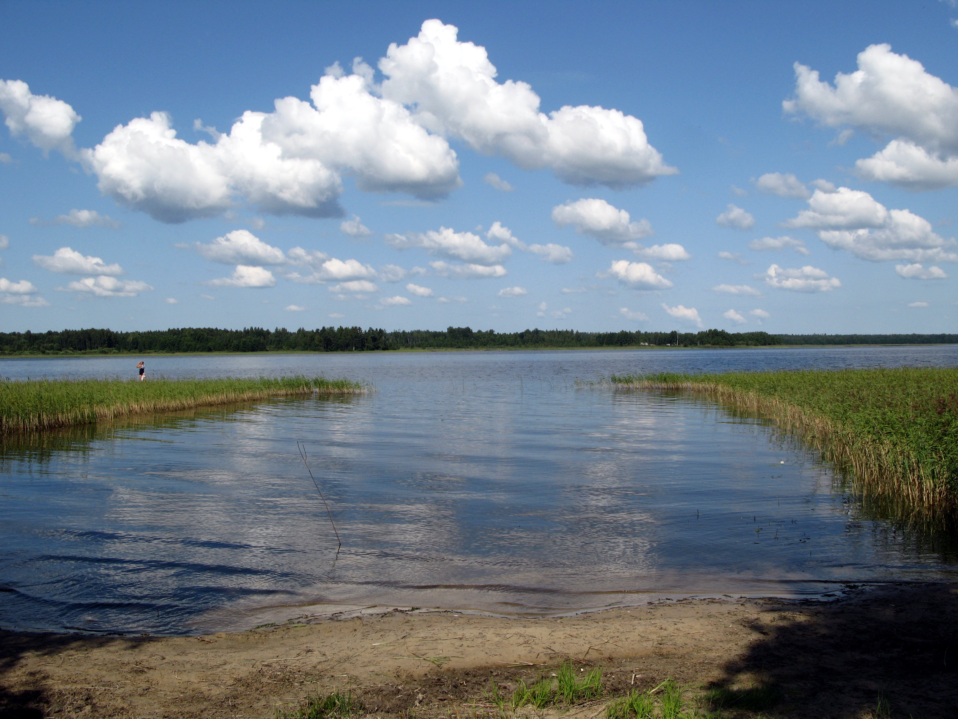 Usmas ezers, Pilsgali 2009.g. 8.augusts